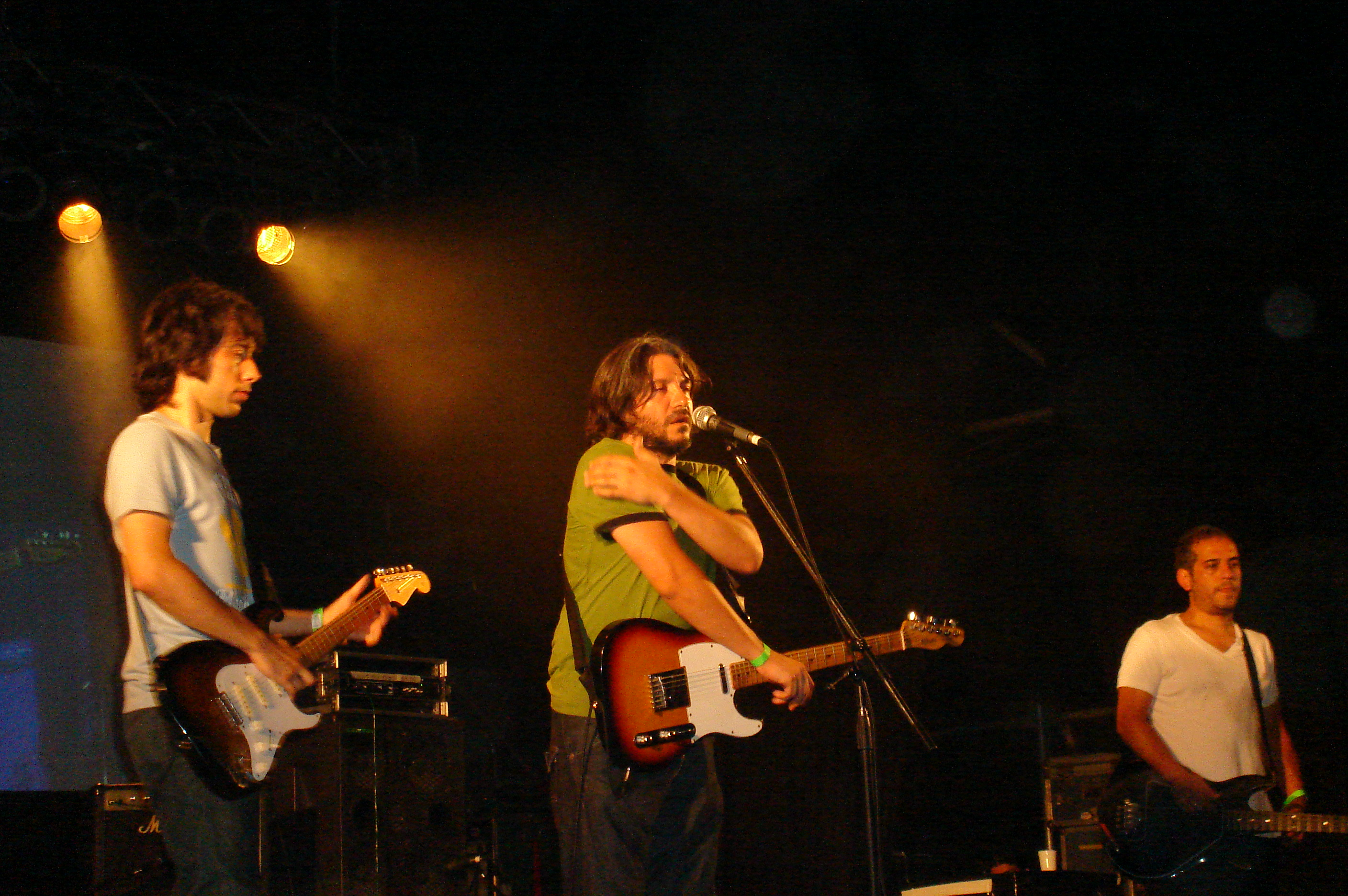 Estelares